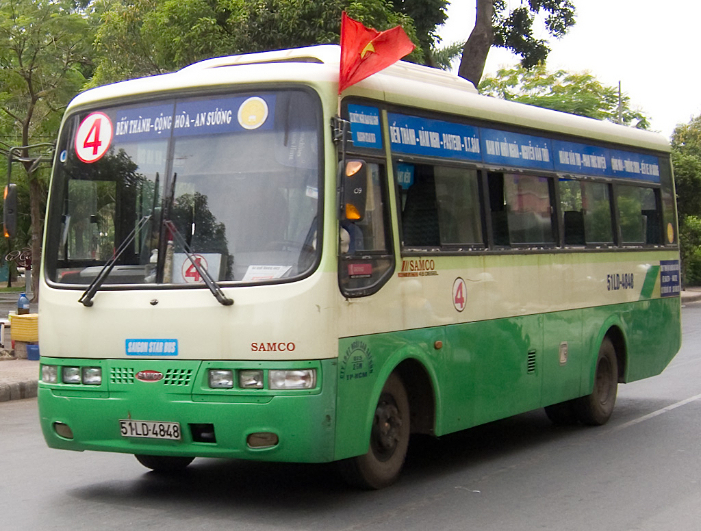 Saigon bus.